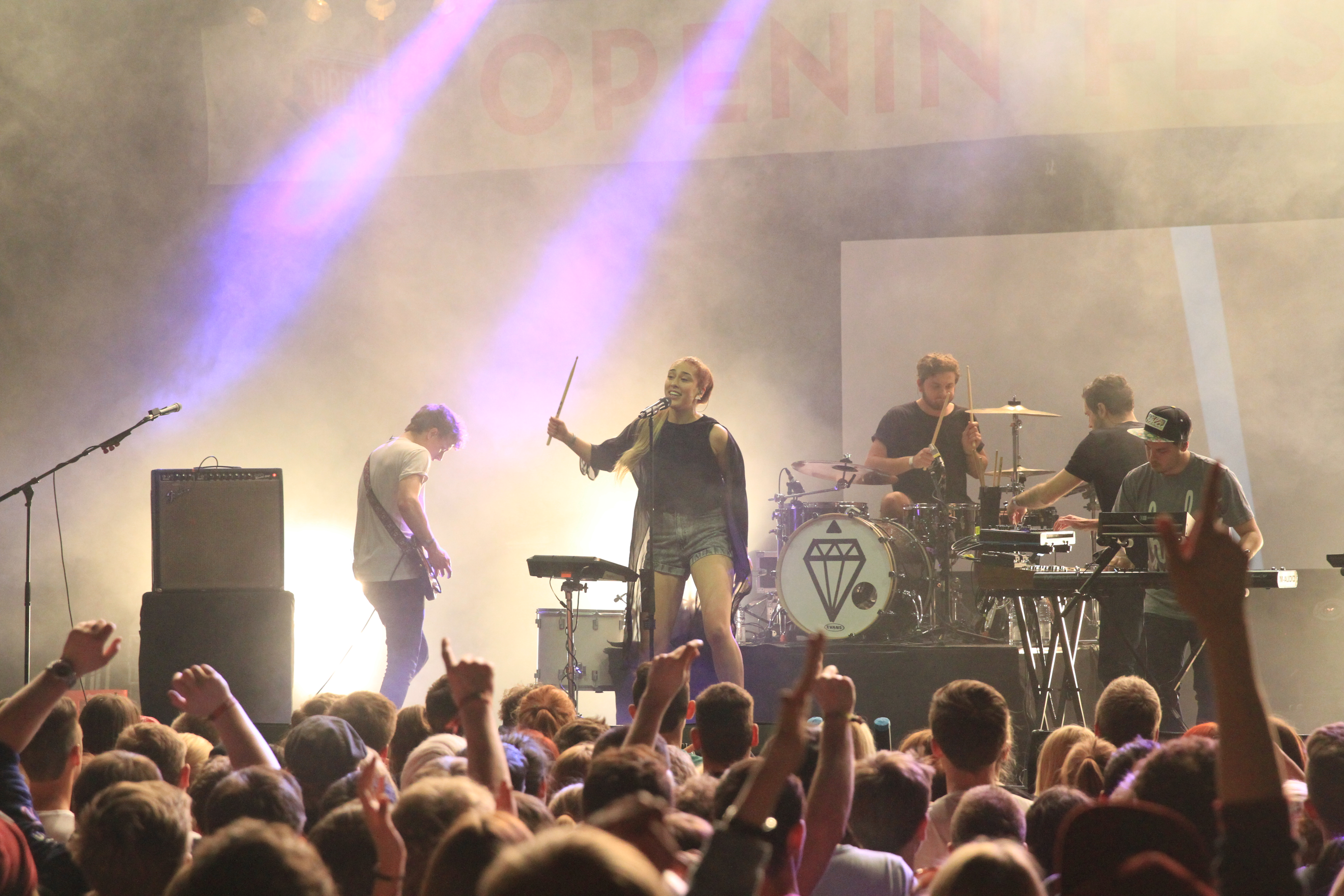 Claire auf dem Openin Festival 2014